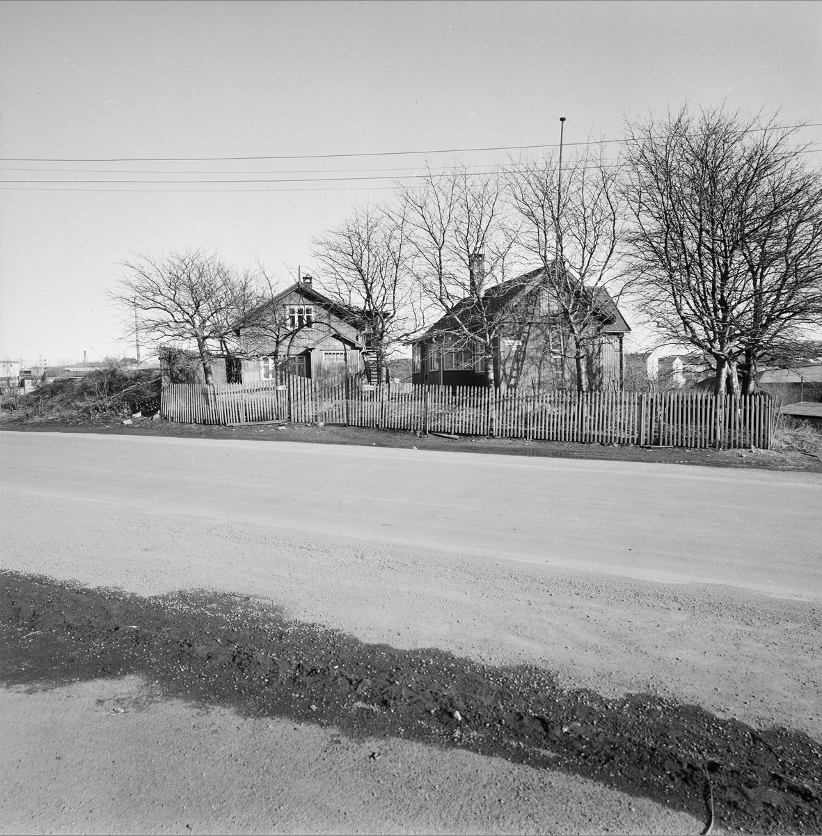 Birigata 6 på Kampen. Huset er revet og gatenavnet faset ut. Foto: Knut B. Eng. Fra Byhistorisk samling hos Oslo Museum.